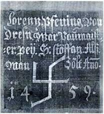 Steinhuggermerke til Lorenz Spenning